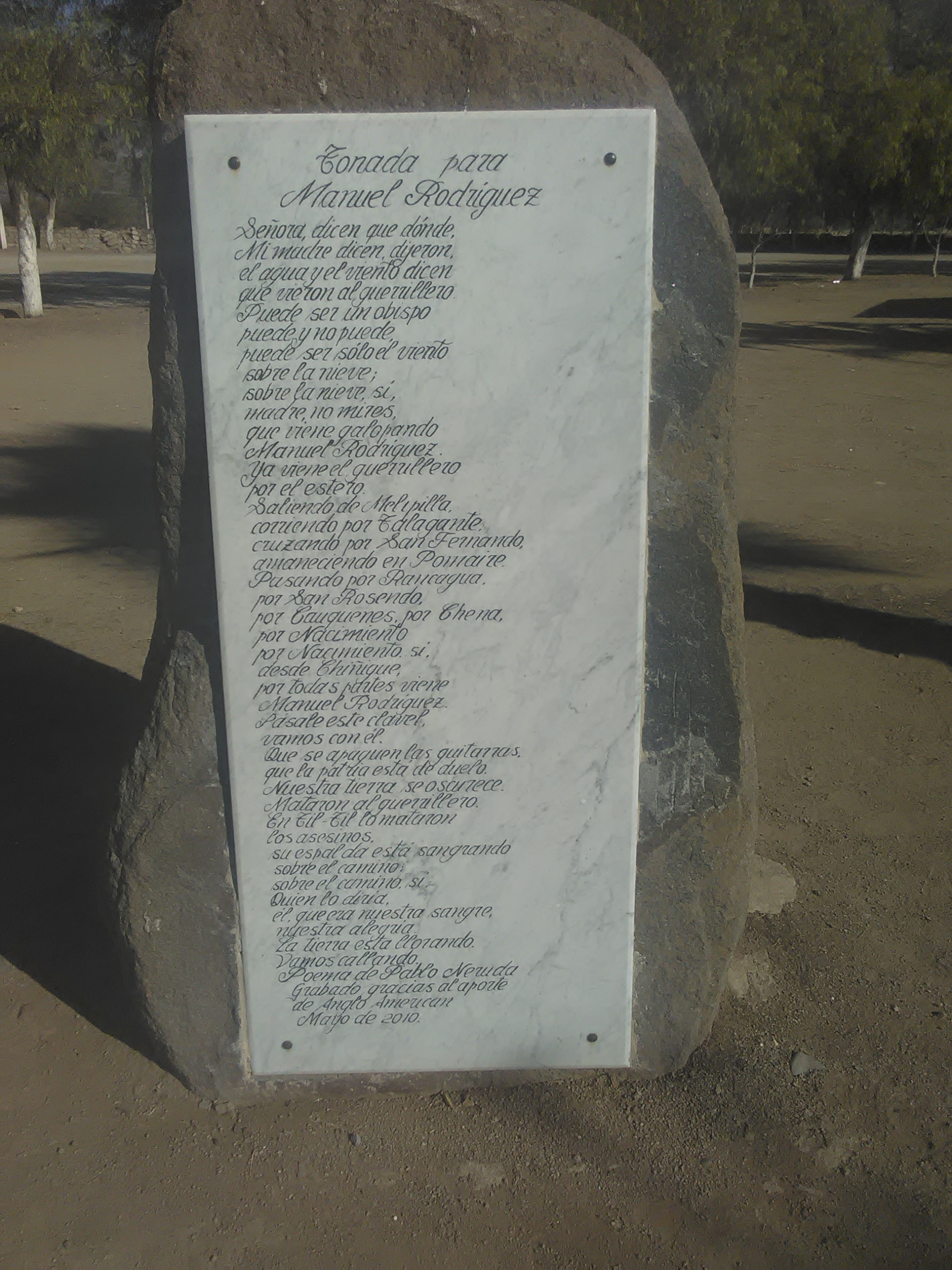 Poema a Manuel Rodríguez erigido en piedra junto al monumento